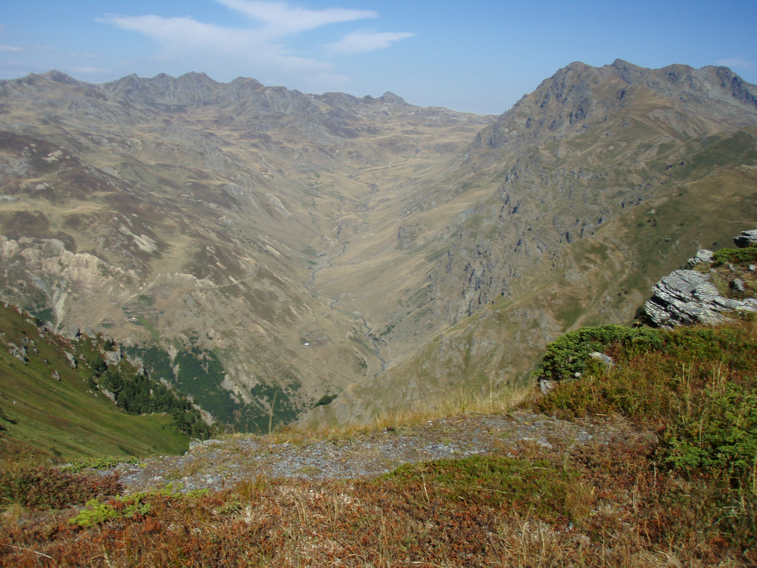 Fot e Bjeshkeve te Sulbices,Tropoje